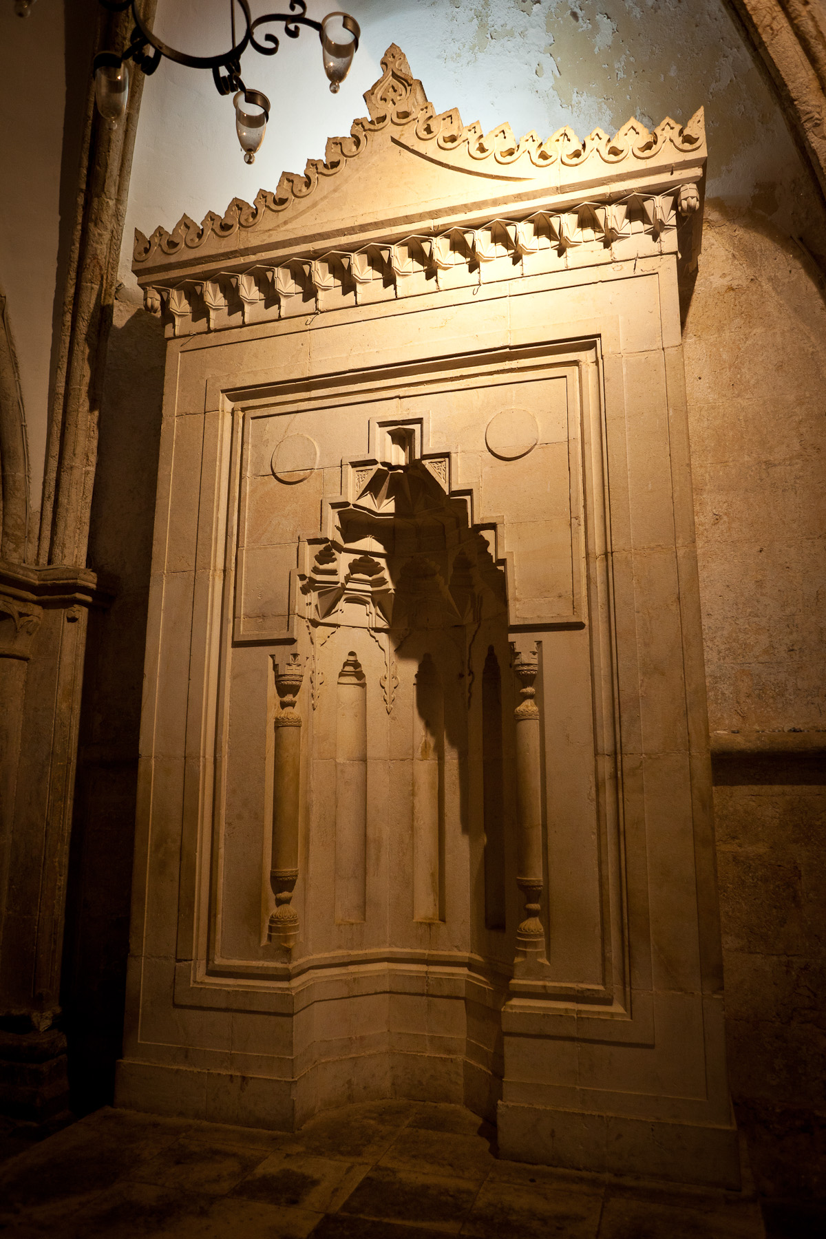 Jerusalem